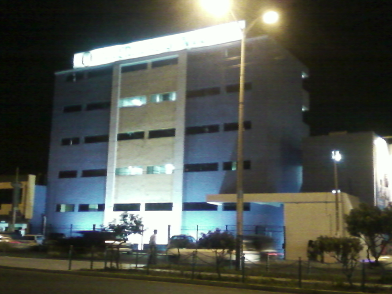 Pabellón de la Universidad San Pedro en el distrito de Nuevo Chimbote